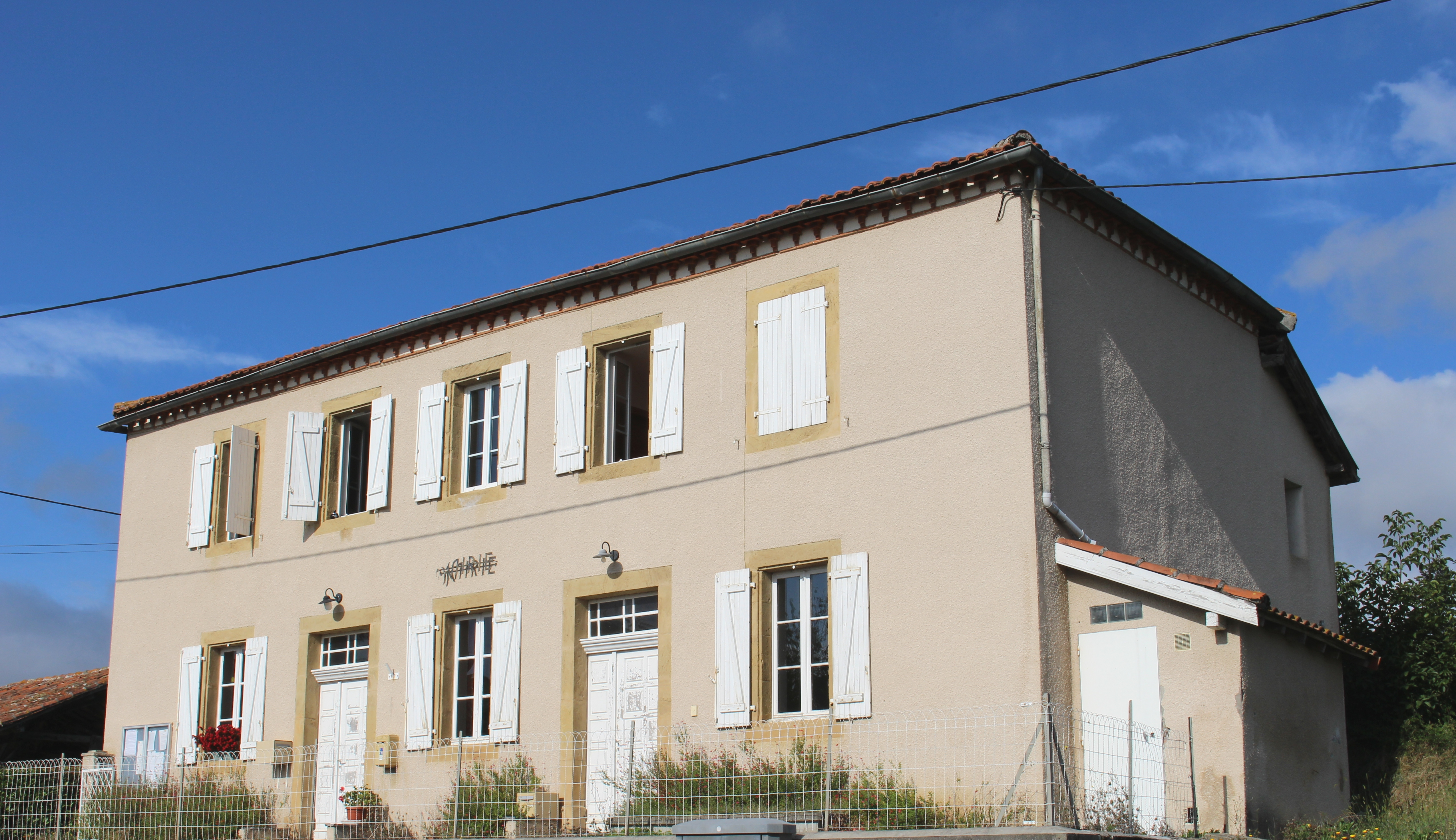 Mairie de Thermes-Magnoac (Hautes-Pyrénées)